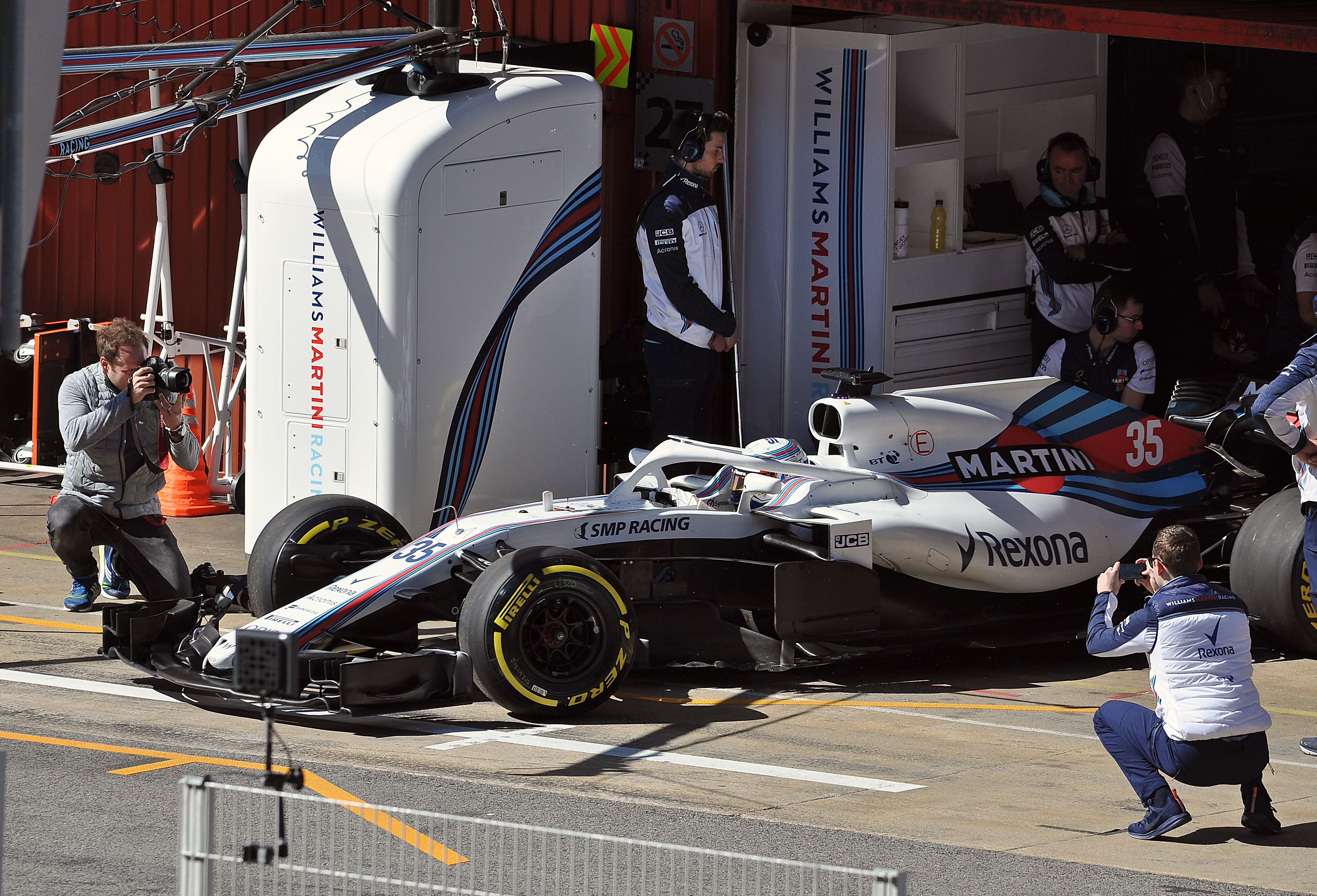 Williams FW41